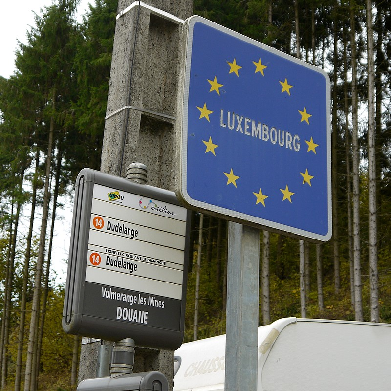 Arrêt de bus du réseau de Thionville implanté à la frontière luxembourgeoise